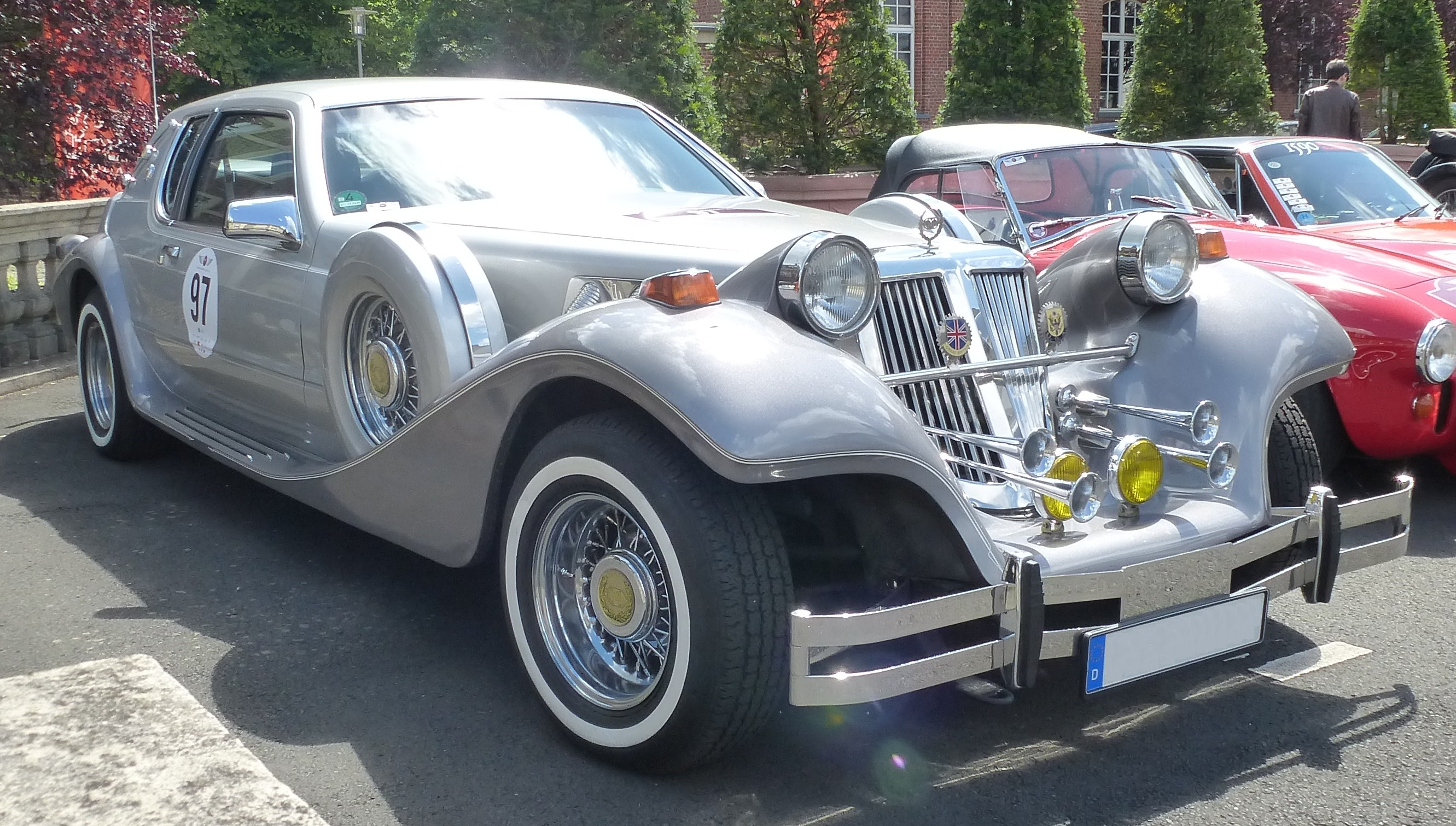 CMC Tiffany 1986